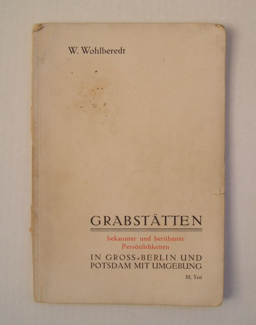 Willi Wohlberedt: Verzeichnis der Grabstätten bekannter und berühmter Persönlichkeiten in Gross-Berlin, Potsdam und Umgebung, Band 3, 1939